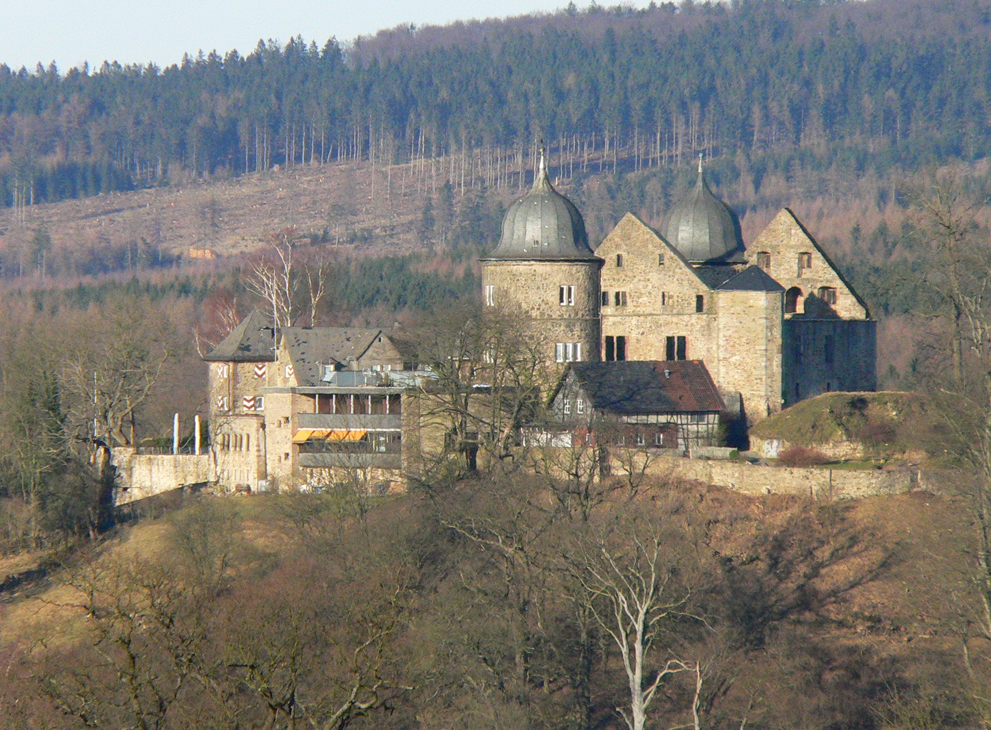 Sababurg im Reinhardswald (Hessen), Ansicht von Südwesten